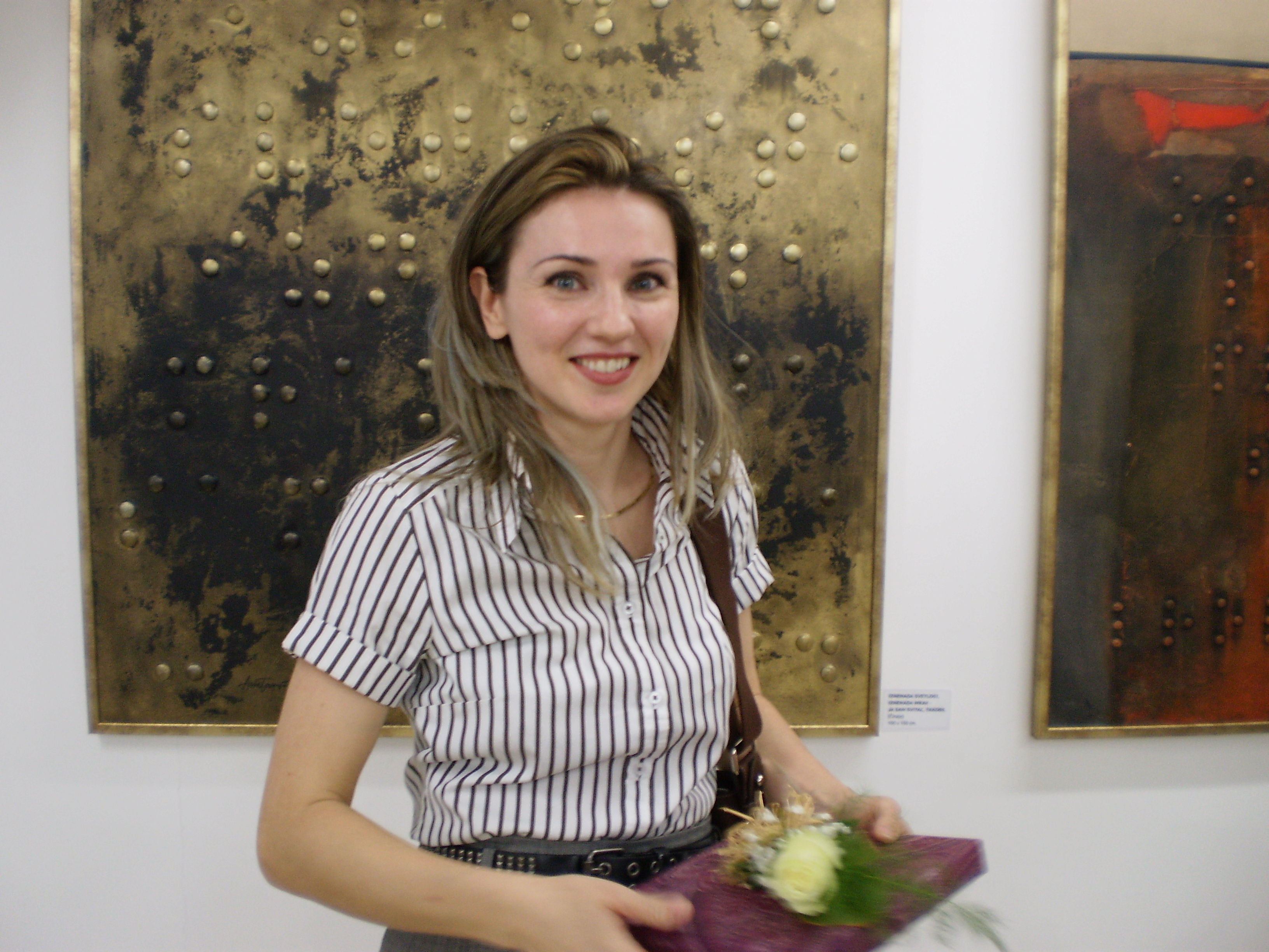 Srpski (latinica): Ana Bonđžić, Niš maj 2013.